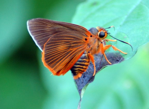 Orange Banded Awl : Bibasis jaina